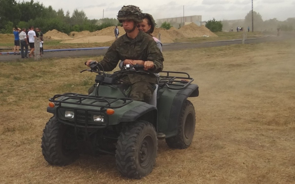 Quad wojskowy 2bpzmot